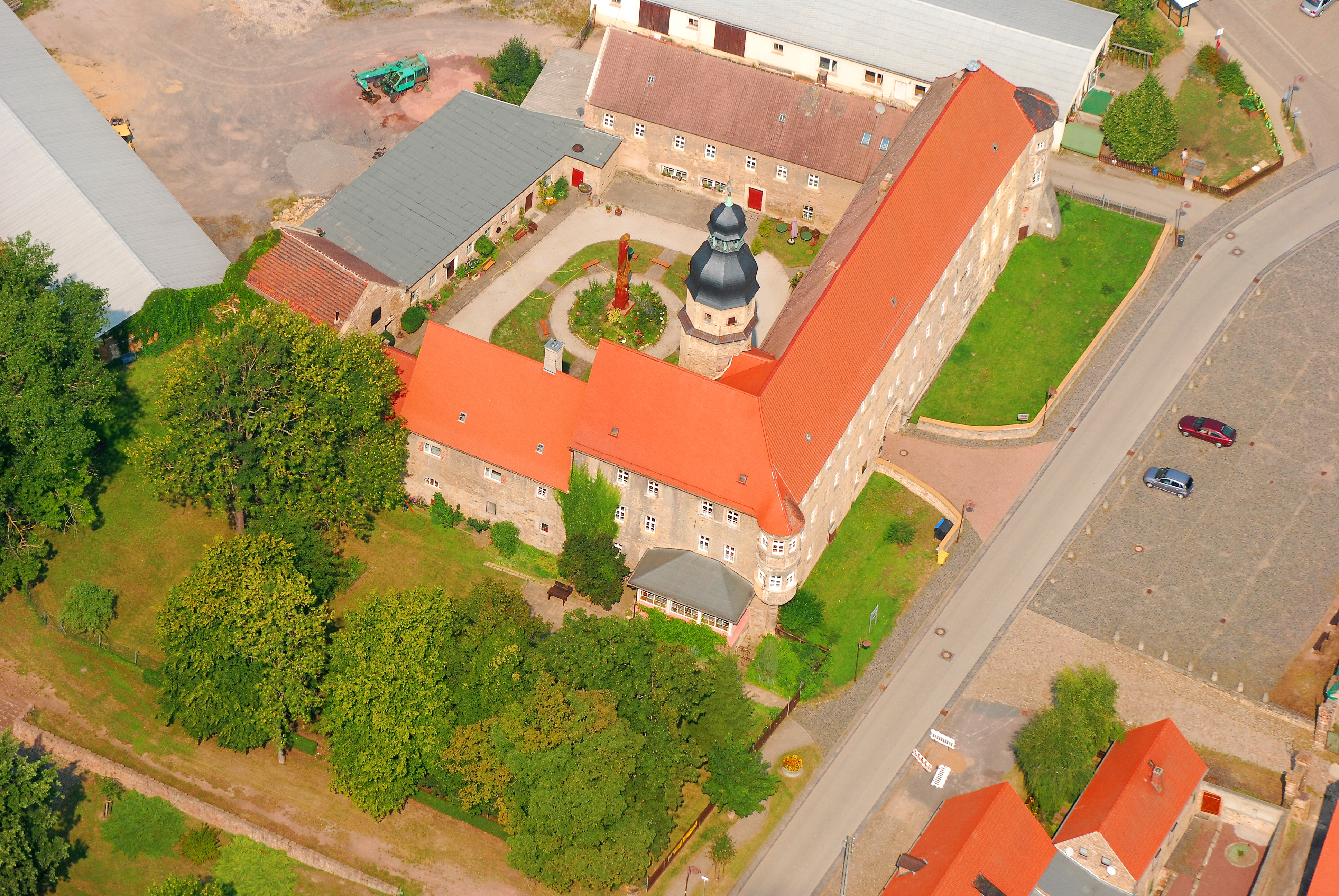 Das ist SCHLOSS SCHOCHWITZ im Jahre 2016